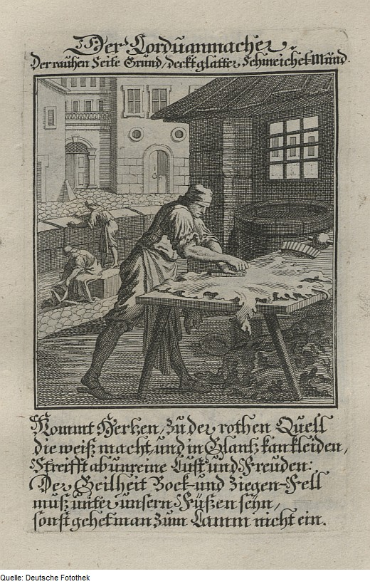 Original image description from the Deutsche FotothekStändebuch & Beruf & Handwerk & Gerber & Leder & Corduan